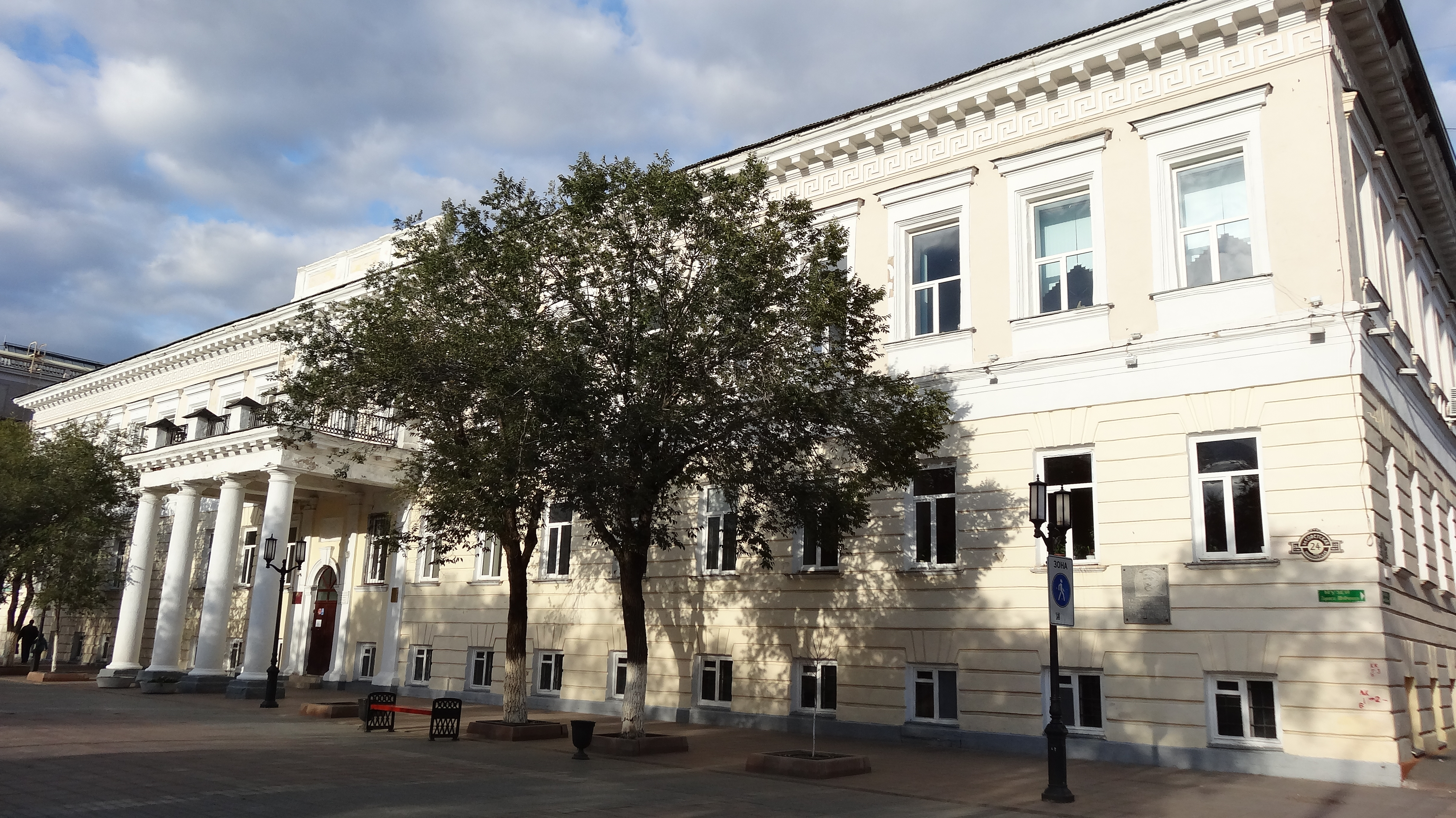 Здание инженерного и генерального штаба (Оренбургская область, Оренбург, советская улица, 24)